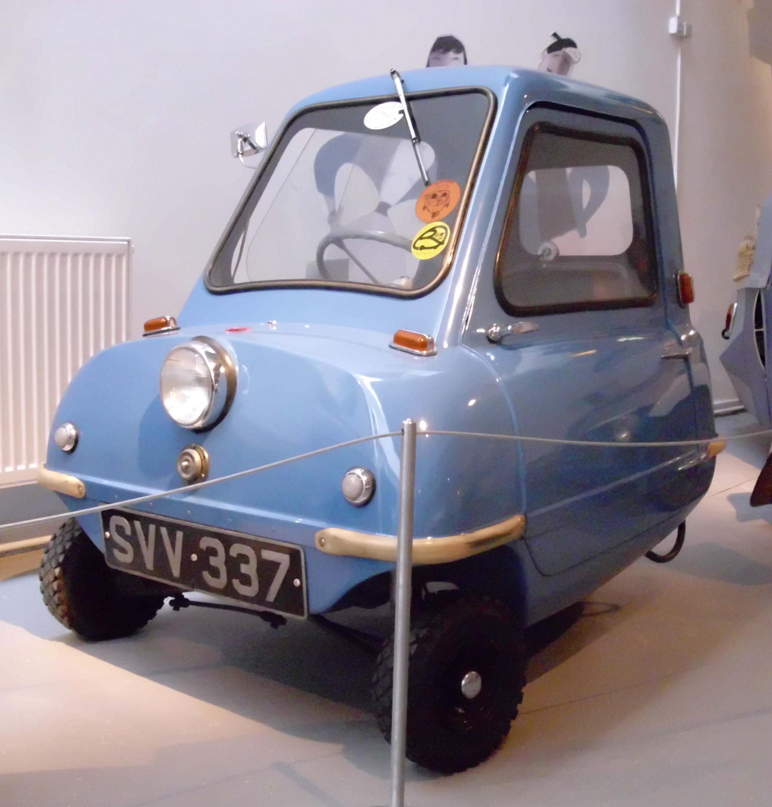 Peel P 50 1963 im RRR Roller, Rollermobile & Wurlitzer-Museum in Eggenburg, Österreich